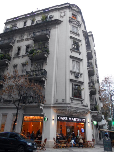 Edificio Corrientes 3799 Café Martínez Arq. Alfredo y Alberto j. Olivari